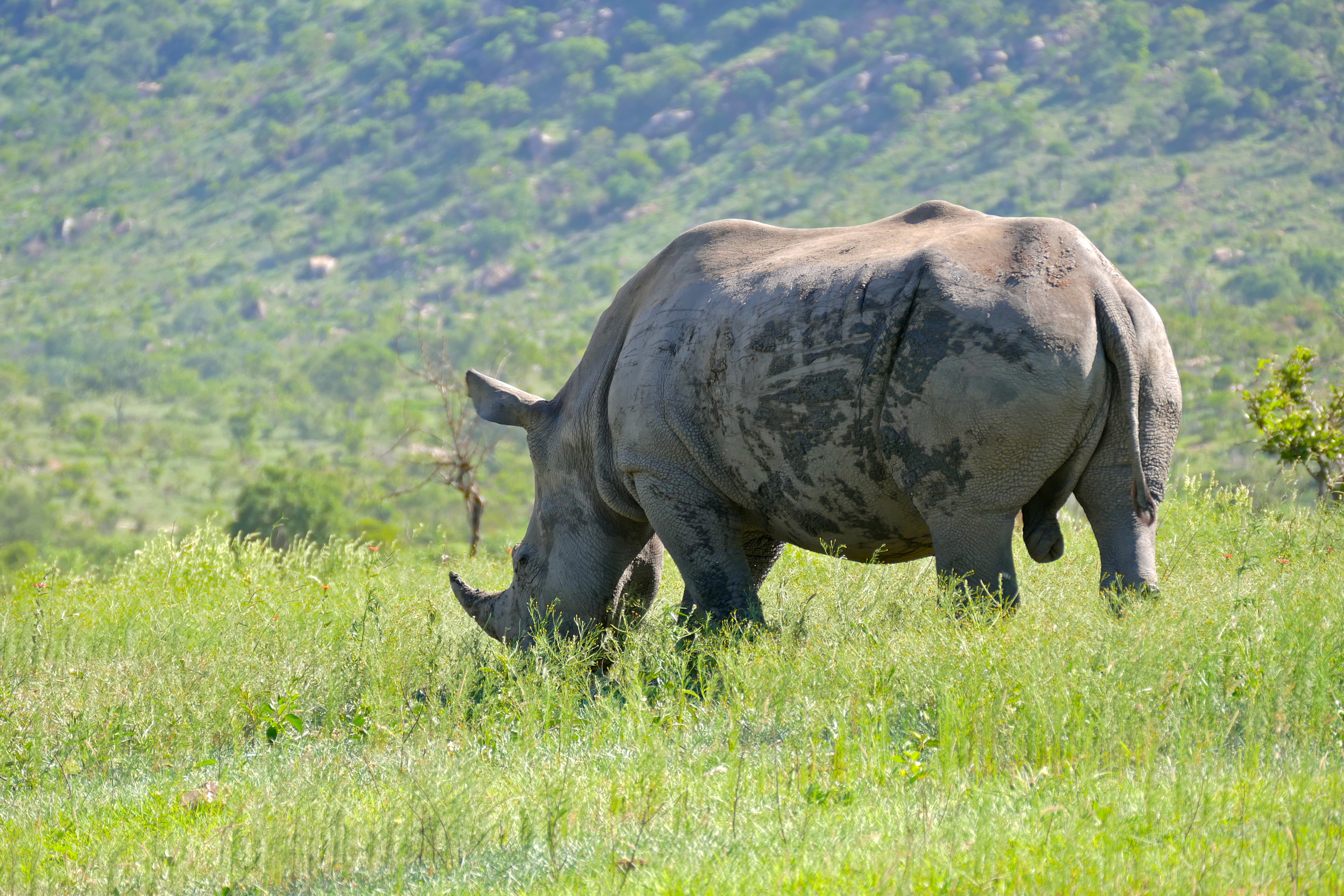 Kruger NP, SOUTH AFRICA